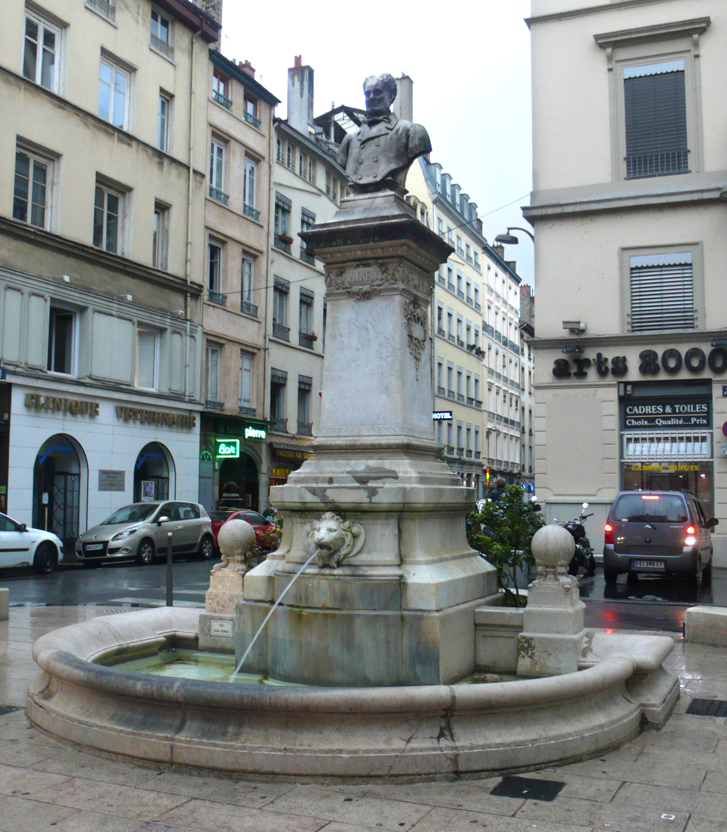 Joseph Bourgeot (1851-1910), Monument à Jean-Pierre Pléney, 1897, Lyon, rue Paul Chenavard et place Meissonier (F-69001, France).